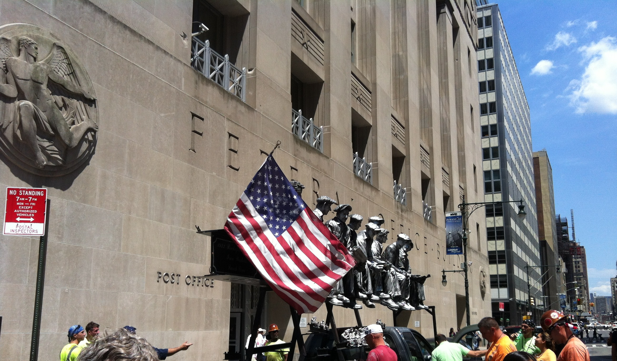 Representación en un puesto de Nueva York de la famosa fotografía "Lunch atop a Skyscraper".